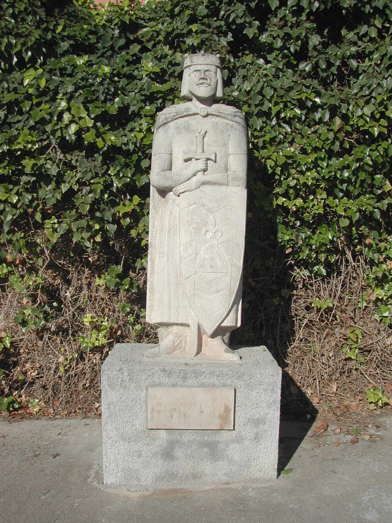 Escultura a Berenguer Arnau d'Anglesola